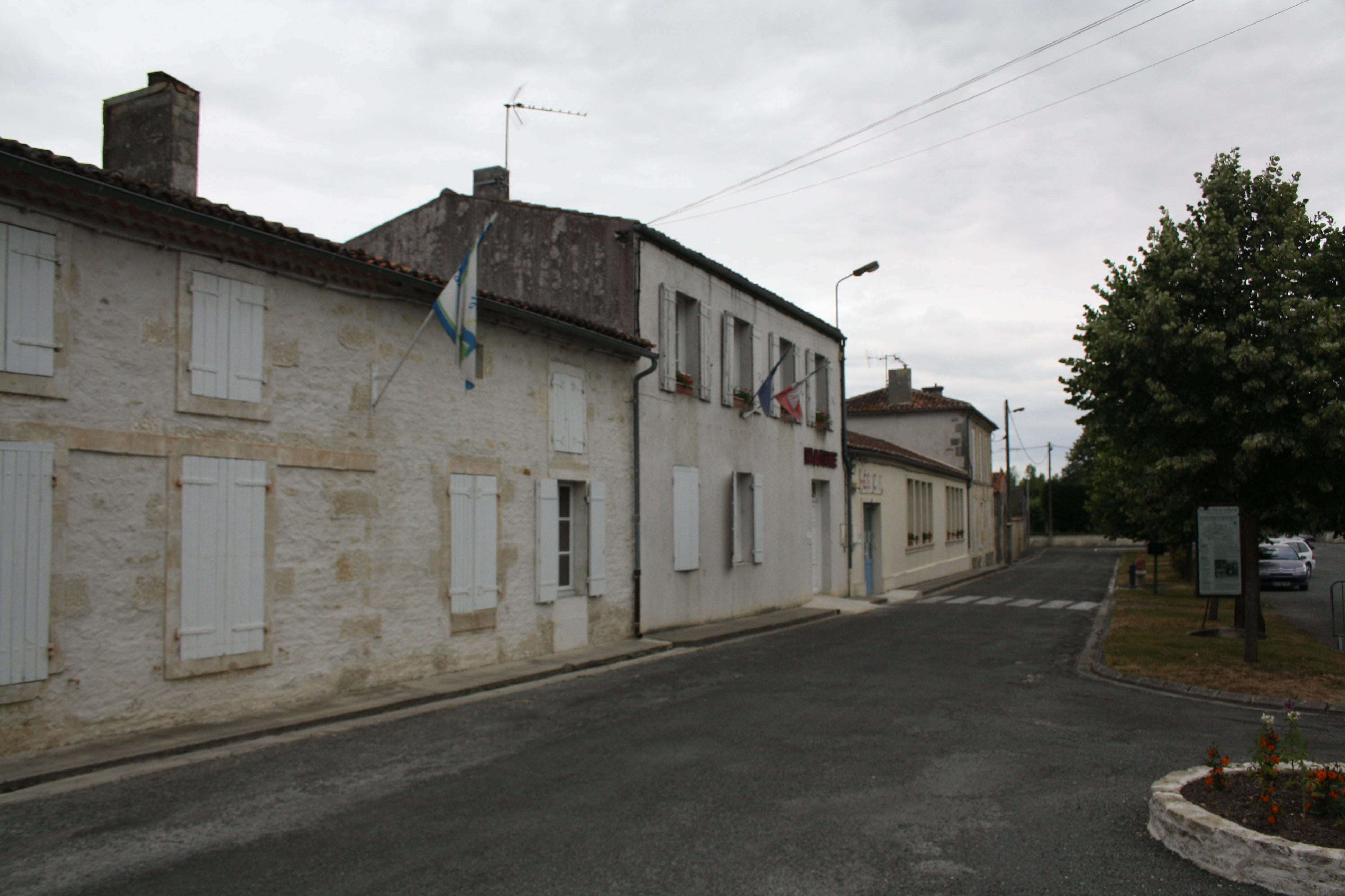 Mairie d'Authon (Charente-Maritime, France).